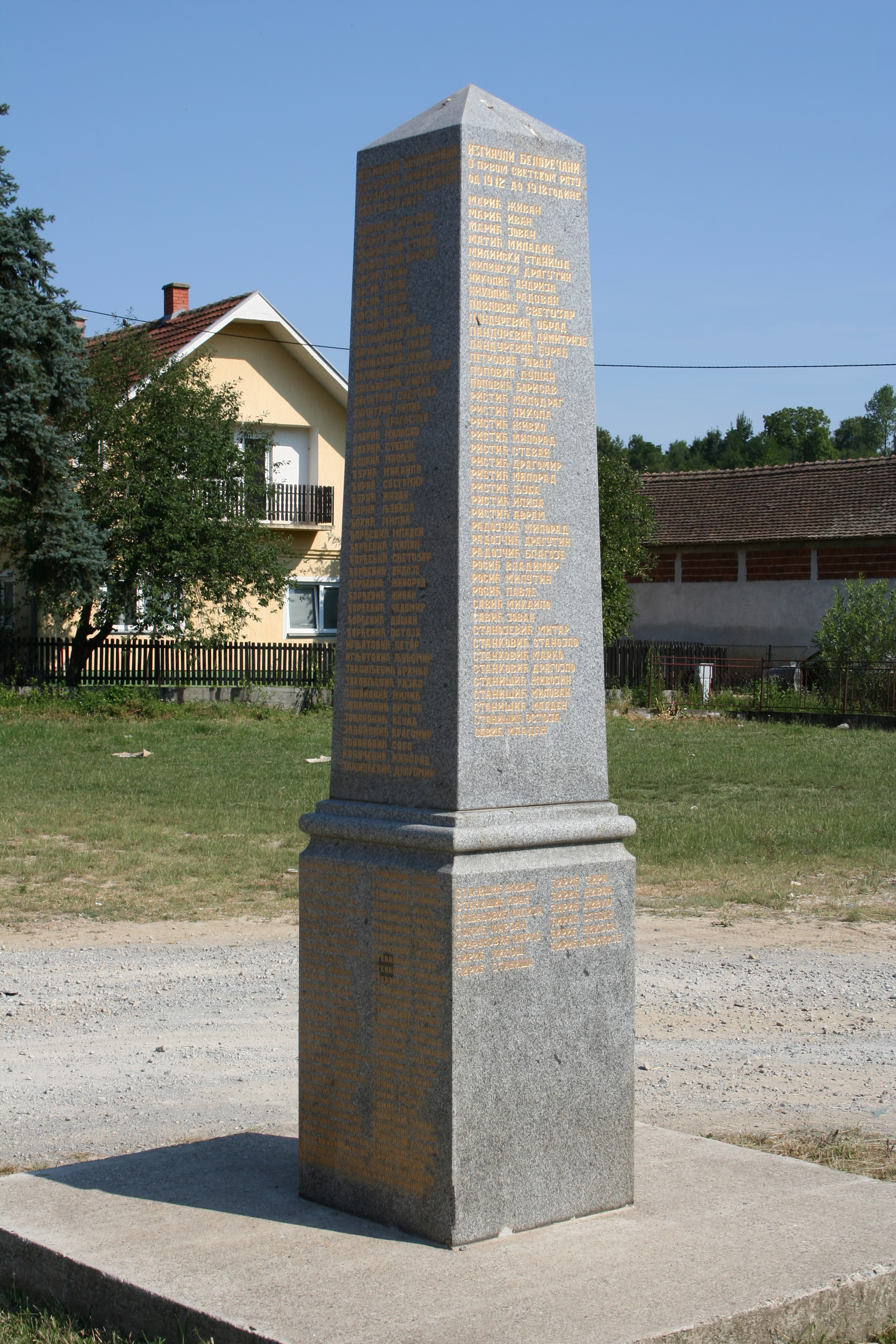 Spomenik u centru sela, Bela Reka